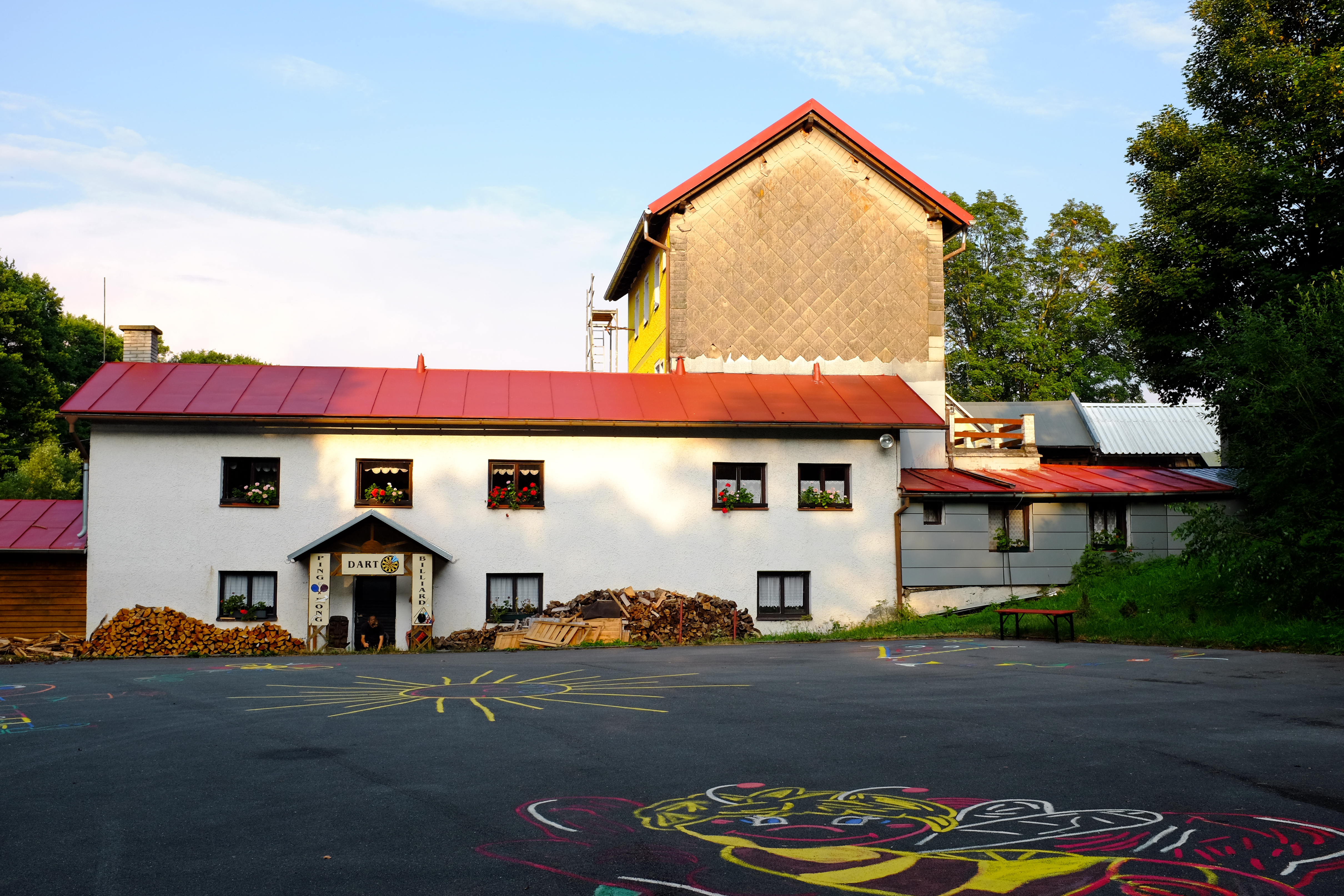 Jedlová (Stará Voda), rekreační areál U Mlýna, okres Cheb